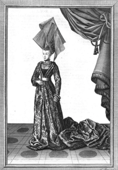 Ermengarde of Anjou (1146)